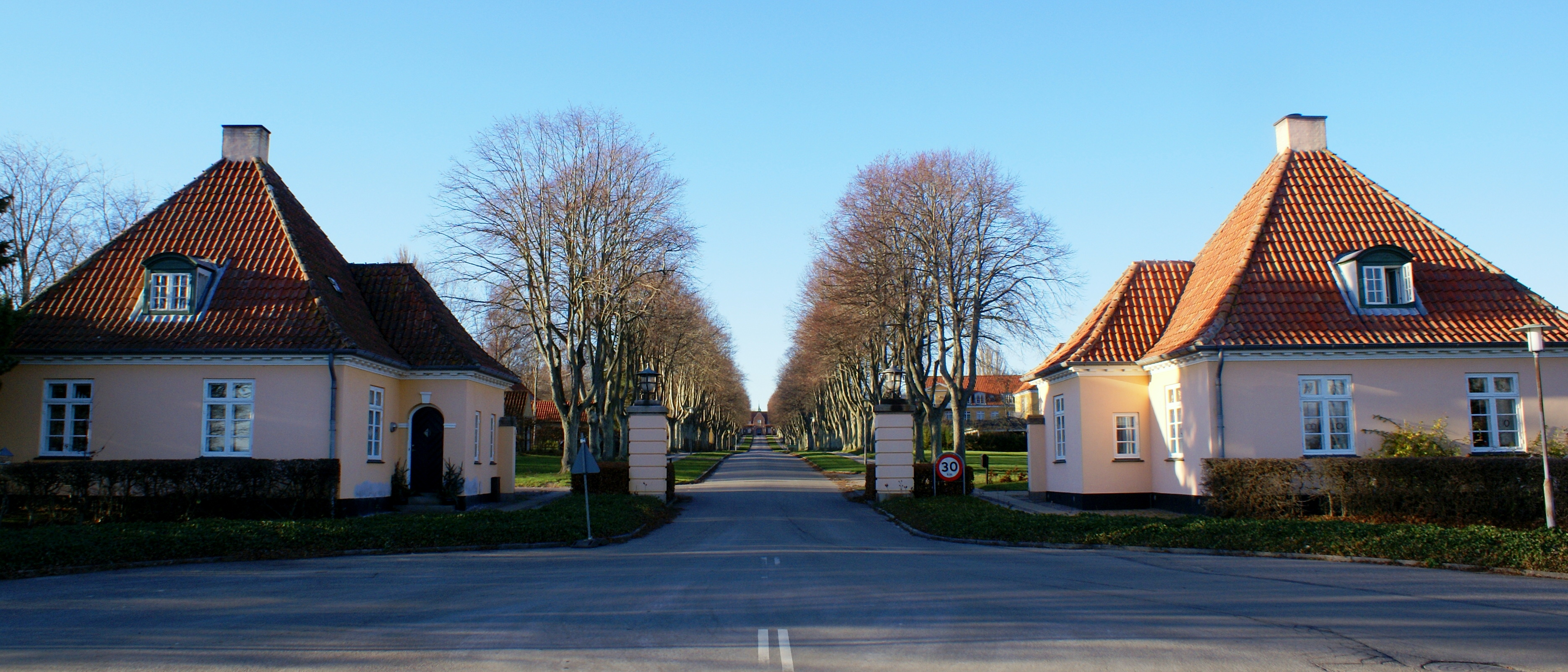 Indkørslen til hospitalet.